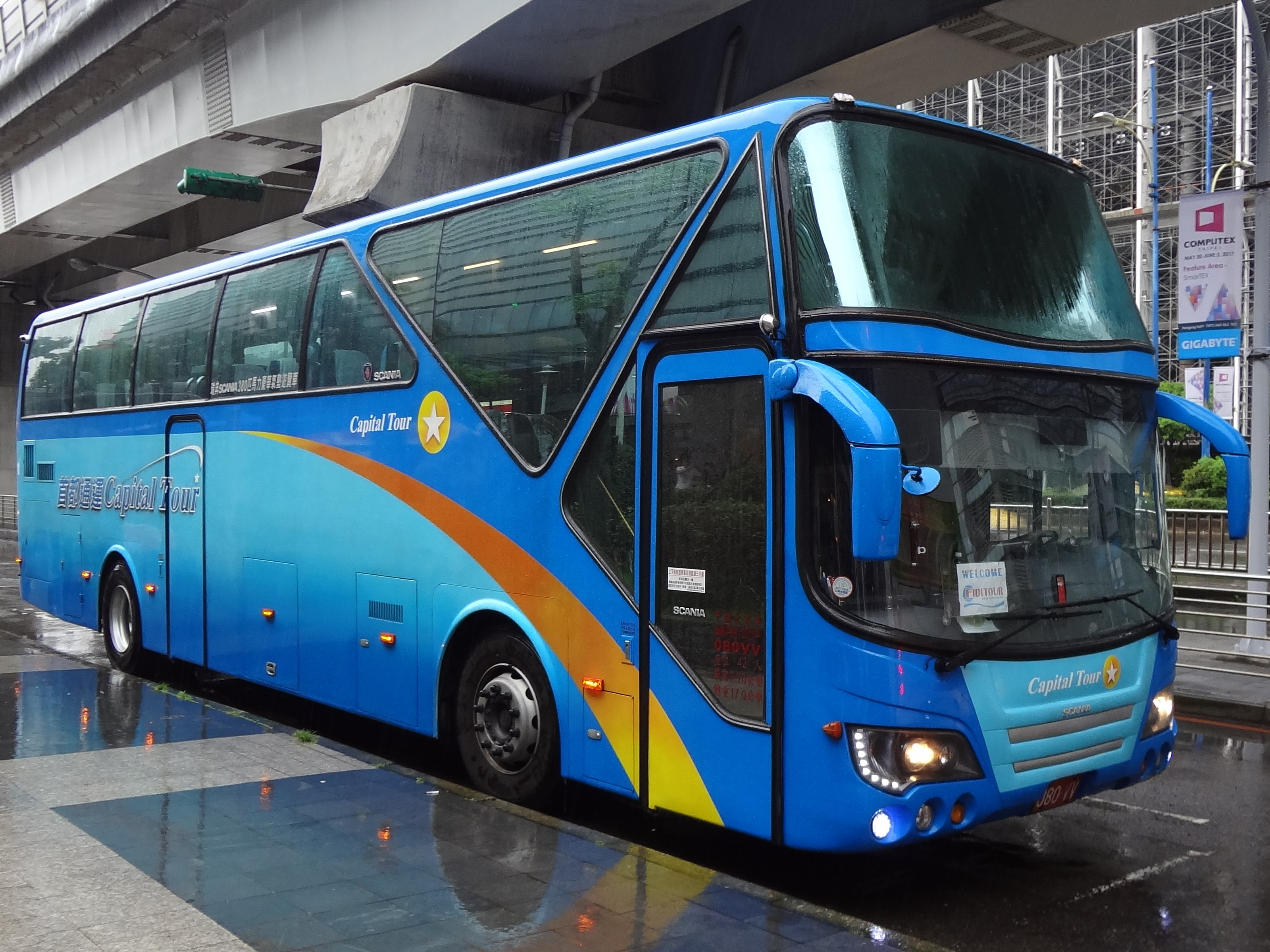 首都通運Scania K380遊覽車080-VV右側外觀。